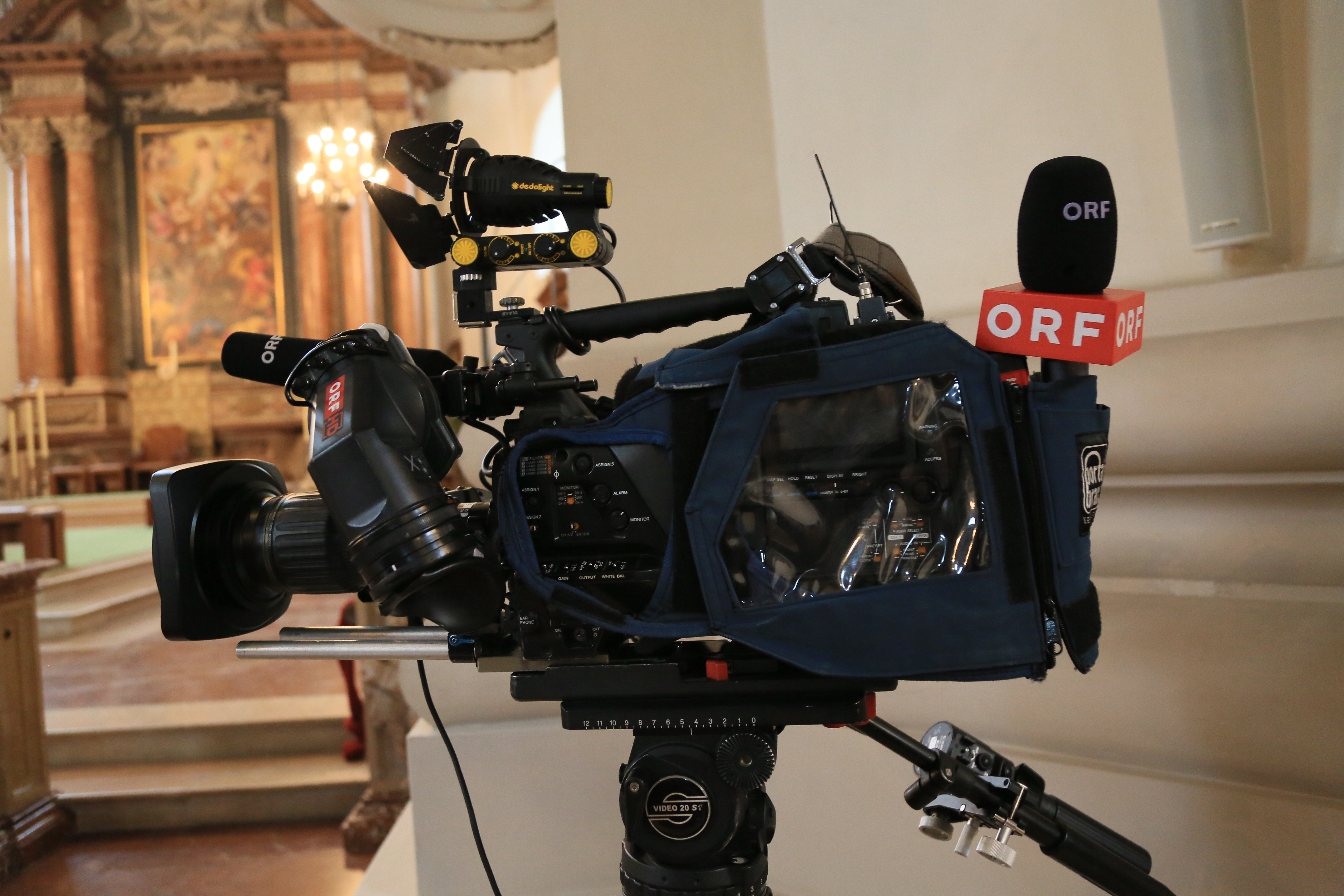 Kamera und Mikrofon des ORF für Filmaufnahmen.